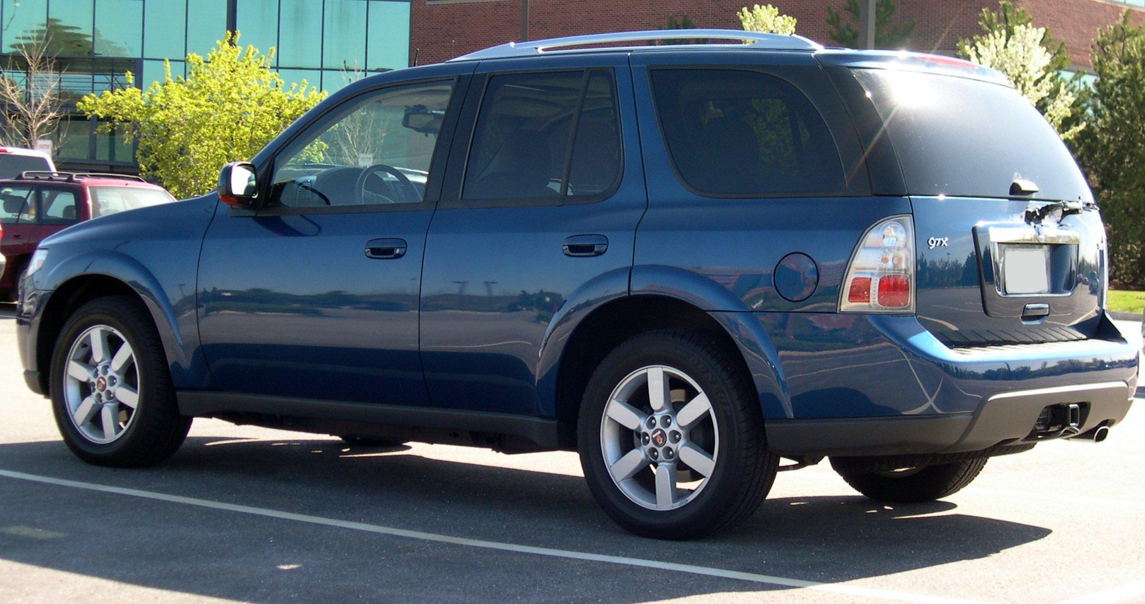 2006 Saab 9-7X